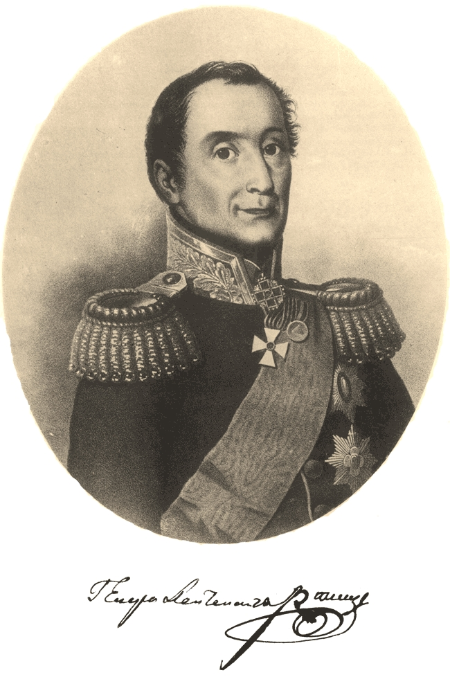 Ртищев, Николай Фёдорович